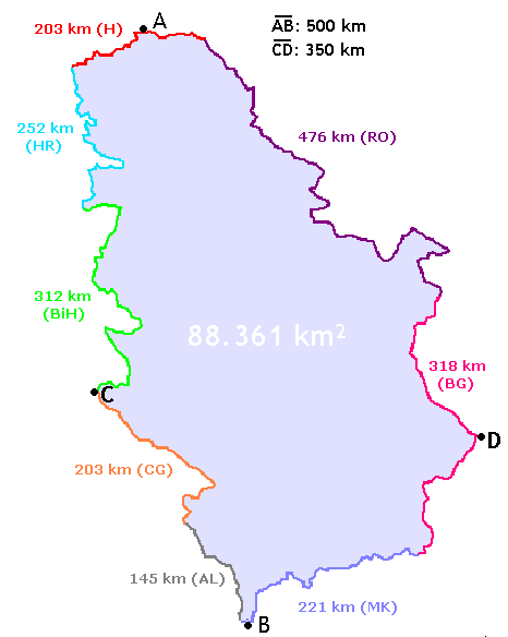 Serbienkarte